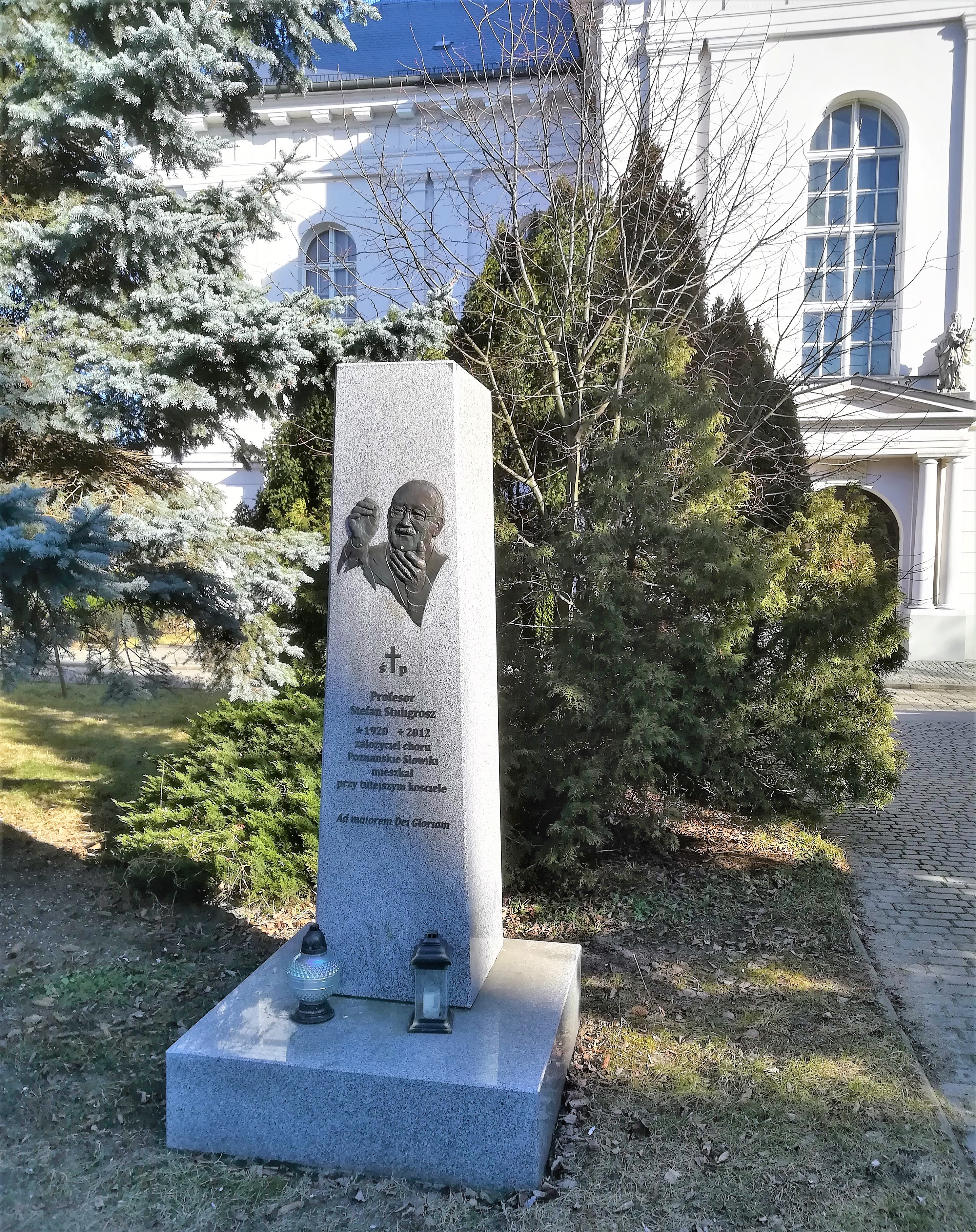 Pomnik Stefana Stuligrosza w Poznaniu - na Grobli.